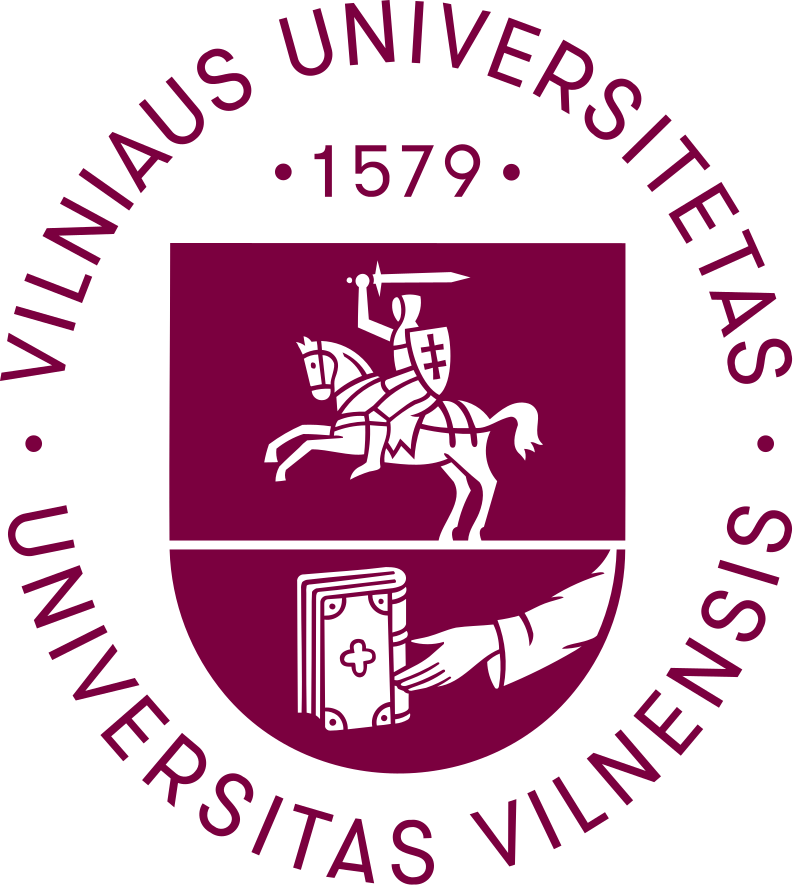 Vilniaus universiteto logotipas